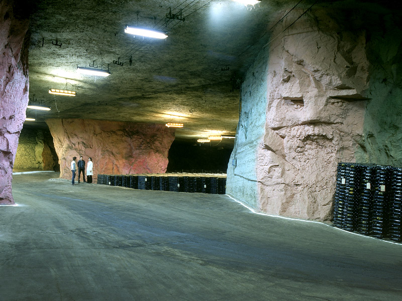 Фото Анастасии Федоренко